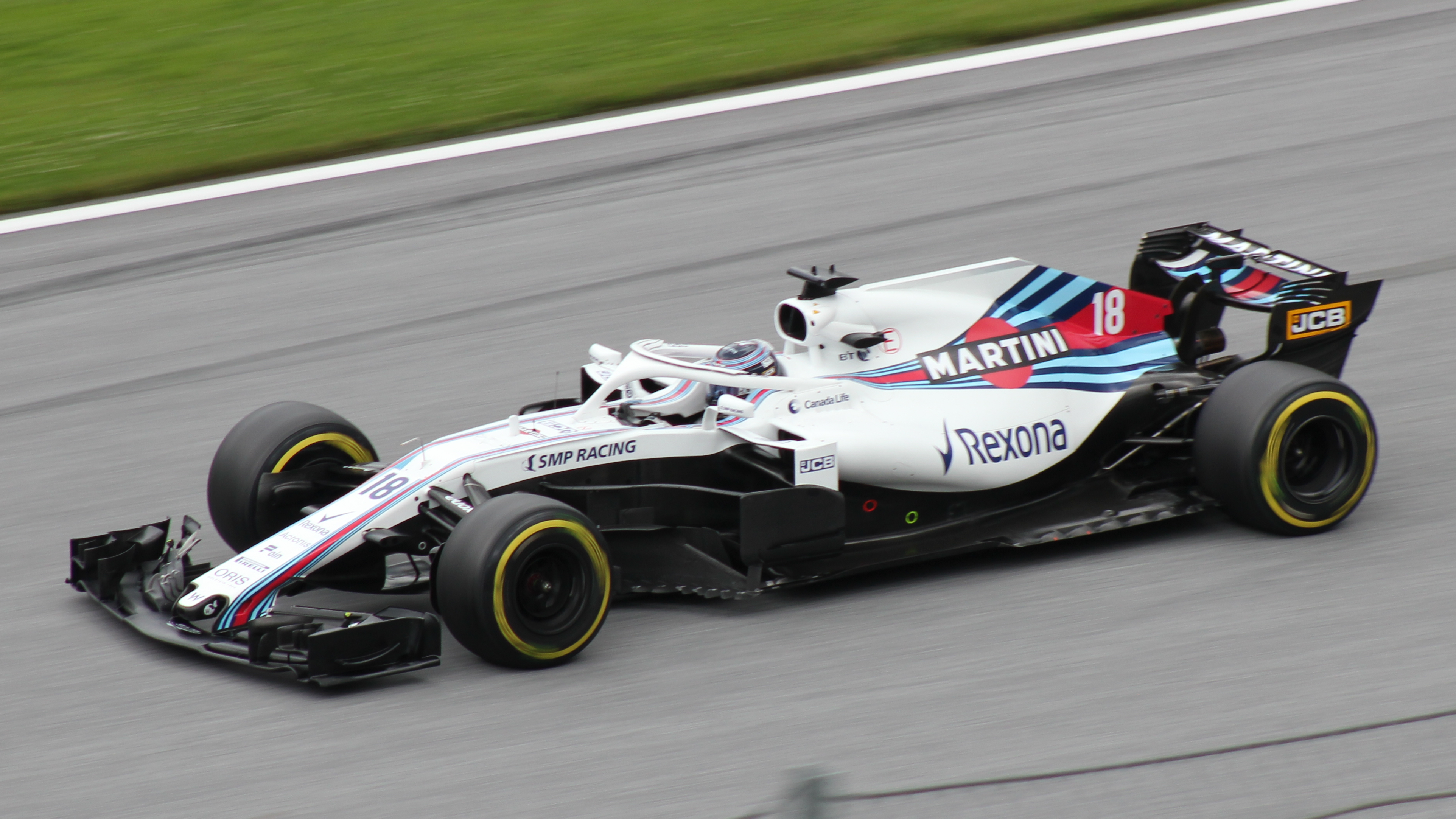 18 Stroll beim Rennwochenende in Österreich 2018